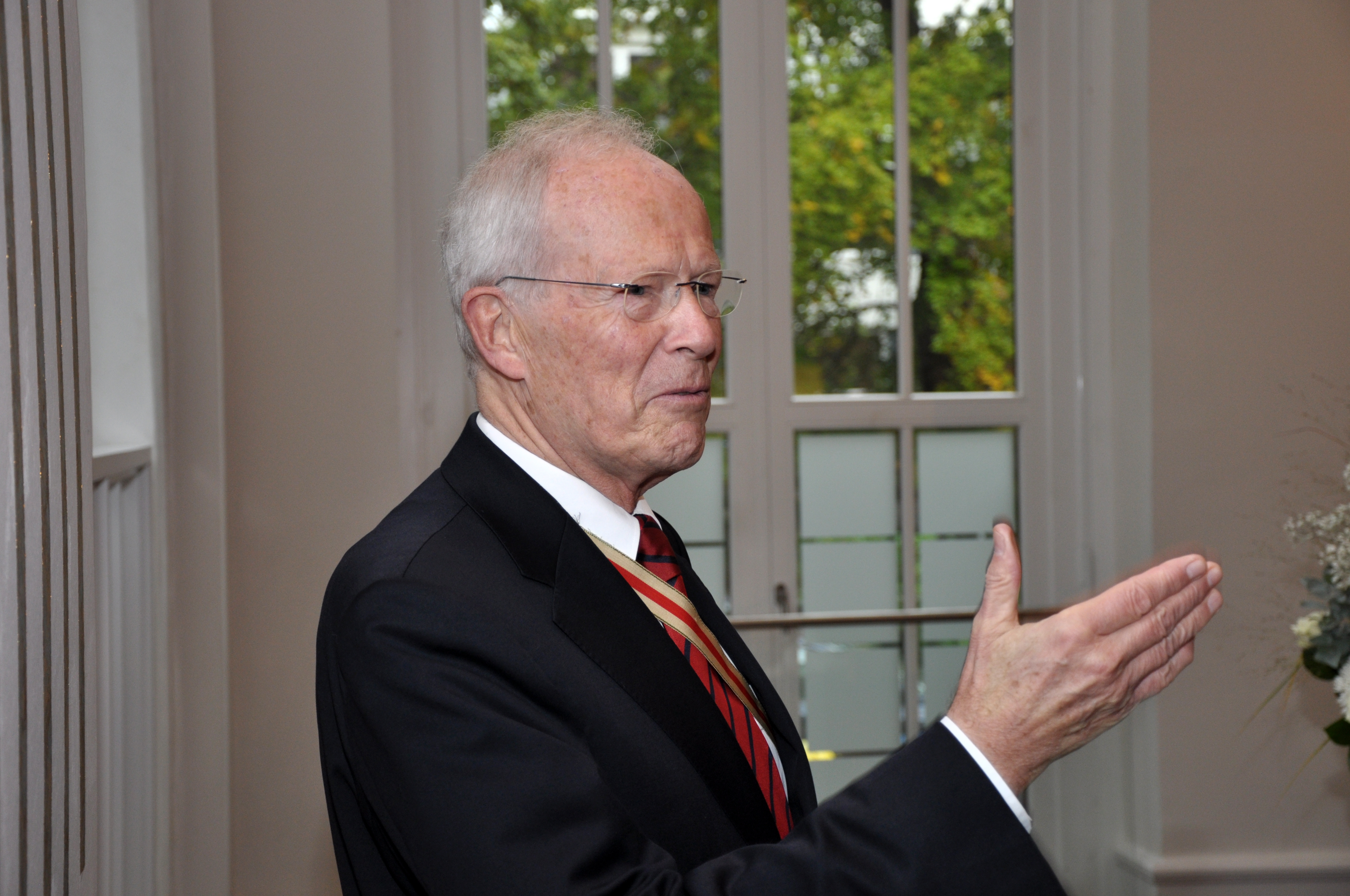 Der Rechtswissenschaftler Edzard Schmidt-Jortzig bei einem Vortrag zum 350-jährigen Jubiläum der Christian-Albrechts-Universität zu Kiel im Kieler Yachtclub.